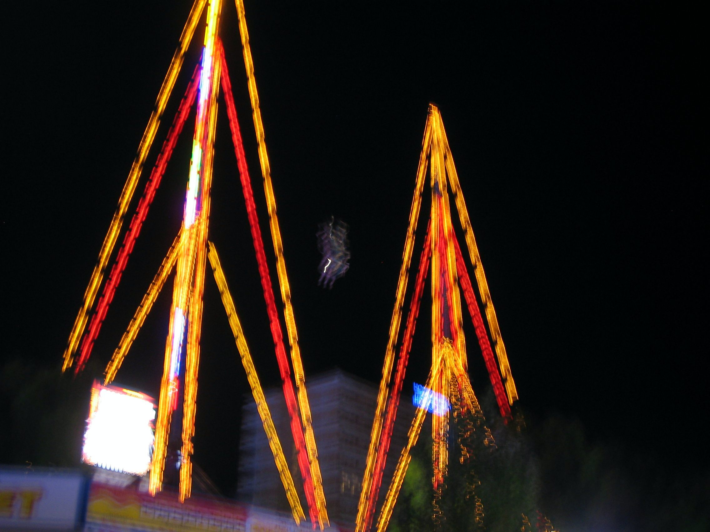 Funfair. The Bungie Rocket at Punta Ballena street in Magalluf, Mallorca, Spain.